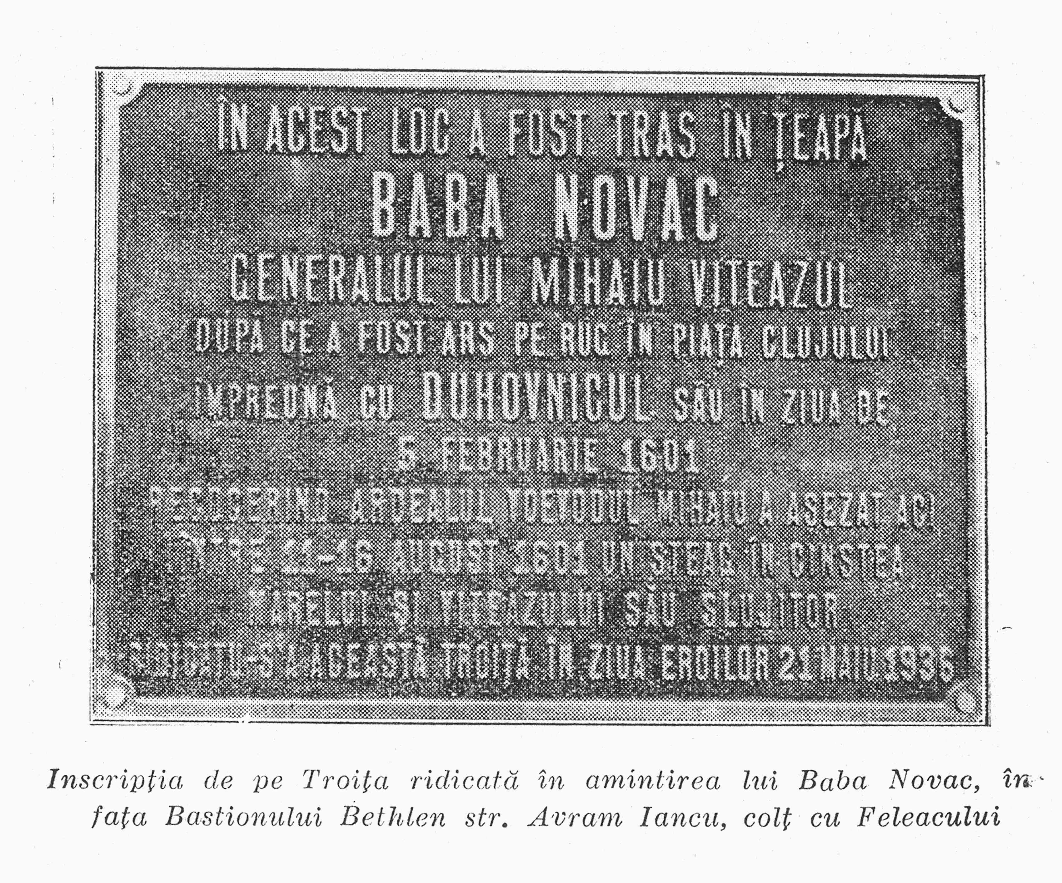 Placuta montata in 1936 la Cluj, in fata Bastionului Croitorilor (Bastionul Bethlen), in memoria lui Baba Novac.